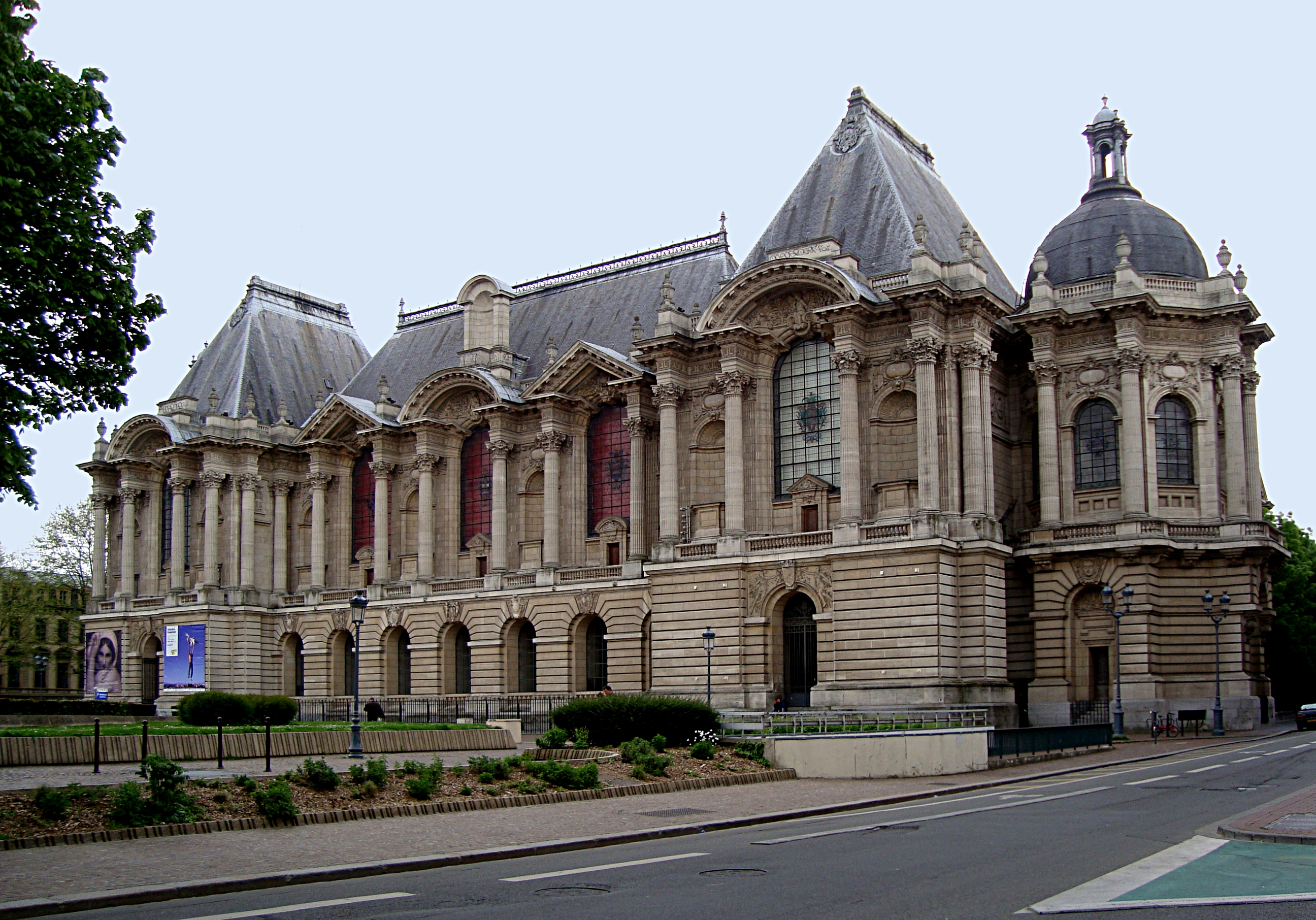 Le palais des Beaux-Arts de Lille (Nord), réalisé de 1885 à 1892 par les architectes Bérard et Delmas.